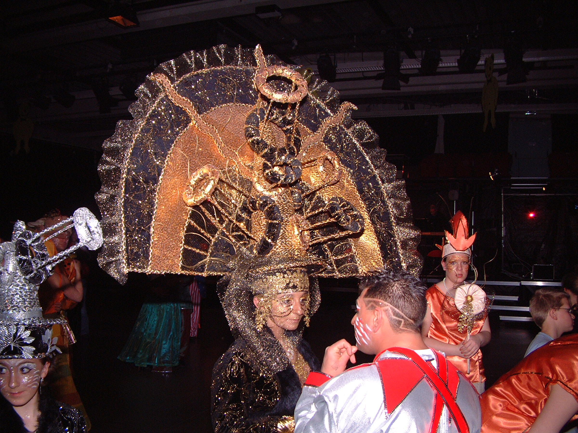 La reine élue lors du bal du carnaval d'Andenne du 11 mars 2006. Photo de Jean-Marc Steux